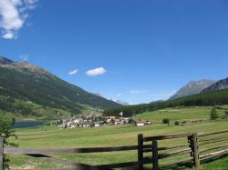 von markus moriggl zur freien verwendung zur verfügung gestellt